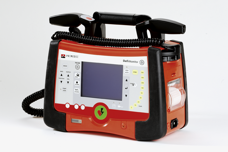 Professioneller transportabler Defibrillator mit Monitor, Drucker, SpO2-Sensor, Pacer (Schrittmacher) und manuellem/automatischen Modus